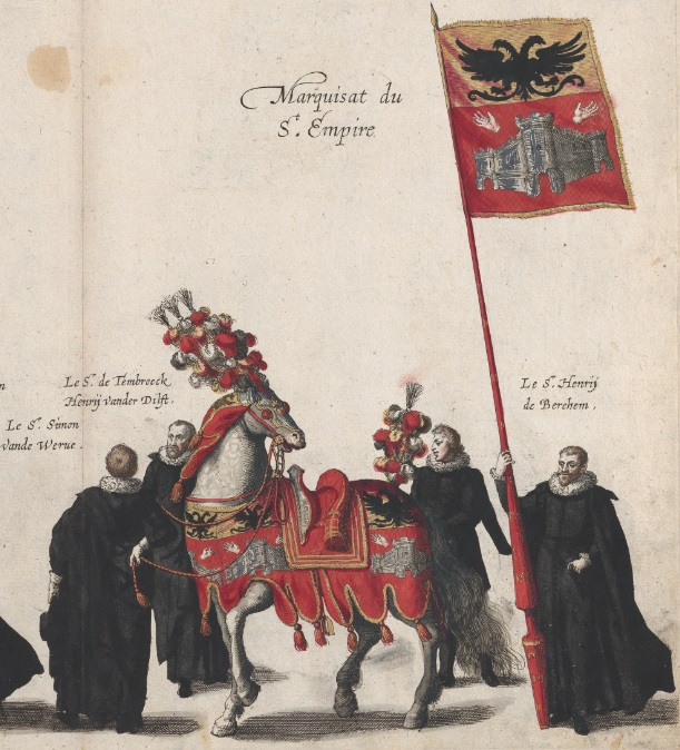 Pompes funèbres de l'archiduc Albert d'Autriche à Bruxelles / Série de 65 gravures d'un recueil relatant les funérailles d'Albert d'Autriche à Bruxelles le 11 mars 1622.